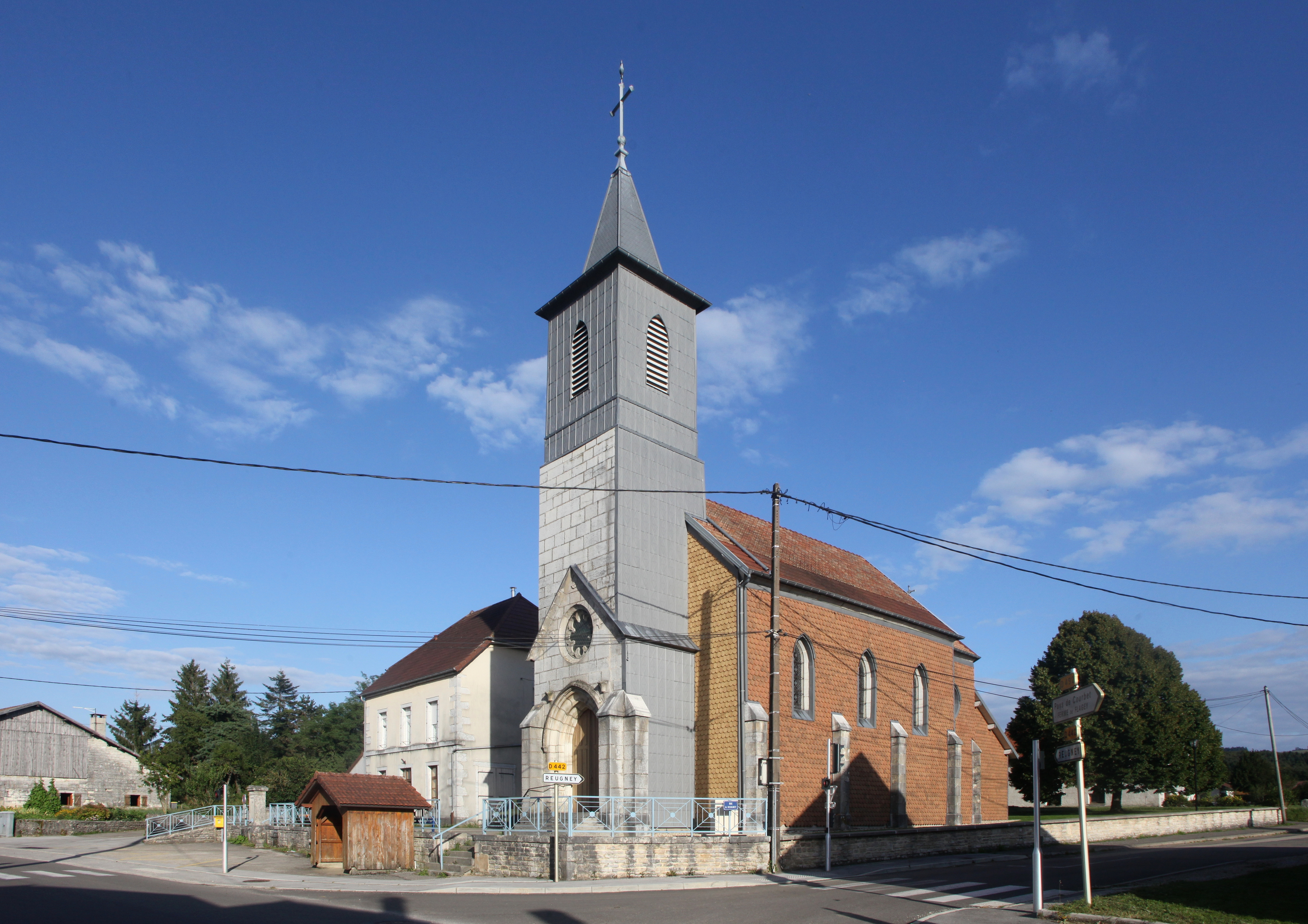 Église de Silley-Amancey (Doubs).